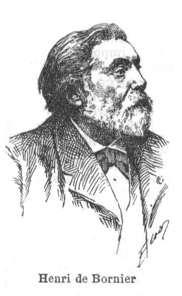 Henri de Bornier (1825-1901); Nouveau Larousse Illustrée; Dictionnaire Universel encyclopédique, publié sous la direction de Claude Augé, deuxieme tome (de Belloc à Ch), édition année 1904.